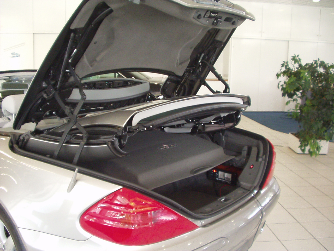 zur Hälfte geöffnetes Variodach MB SL